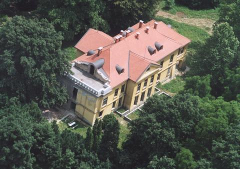 Kisgyalán, Hungary, aerialphotography. Gázlópuszta - Festetics-kastély és parkja.